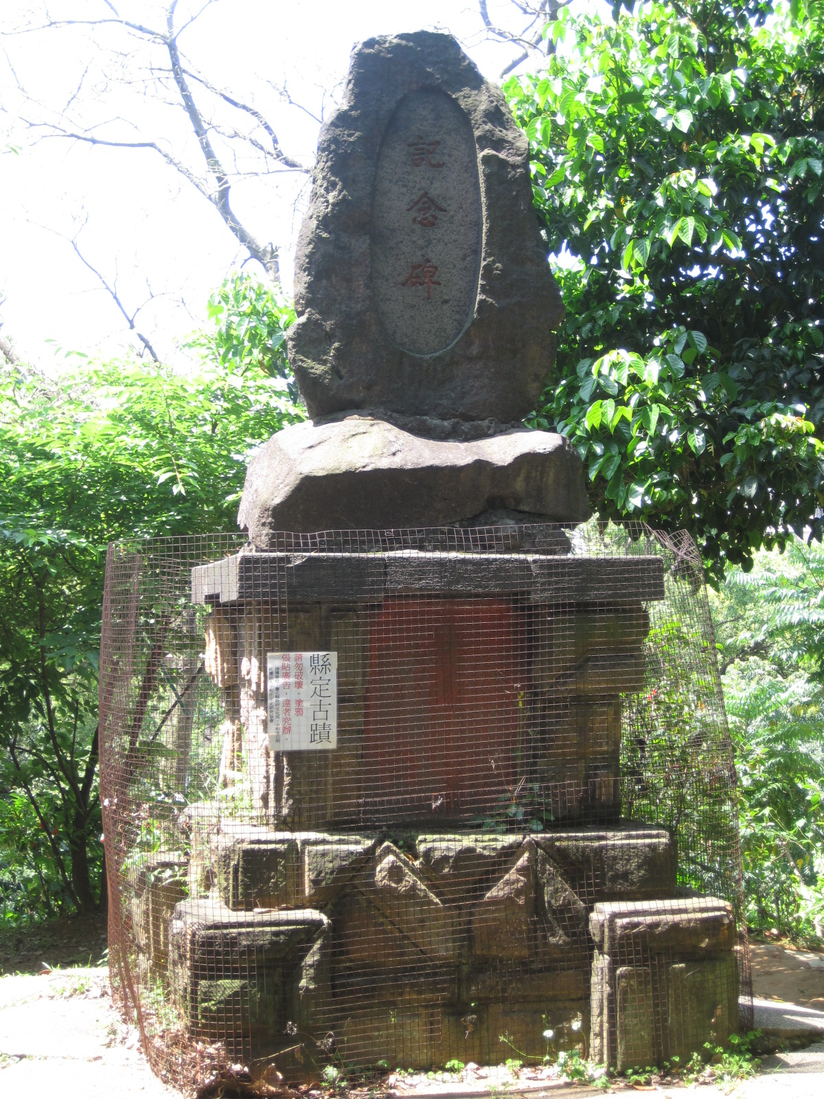 中文（台灣）: 紀念山本義信的紀念碑，位於臺灣新北市中和區的自強公園內。